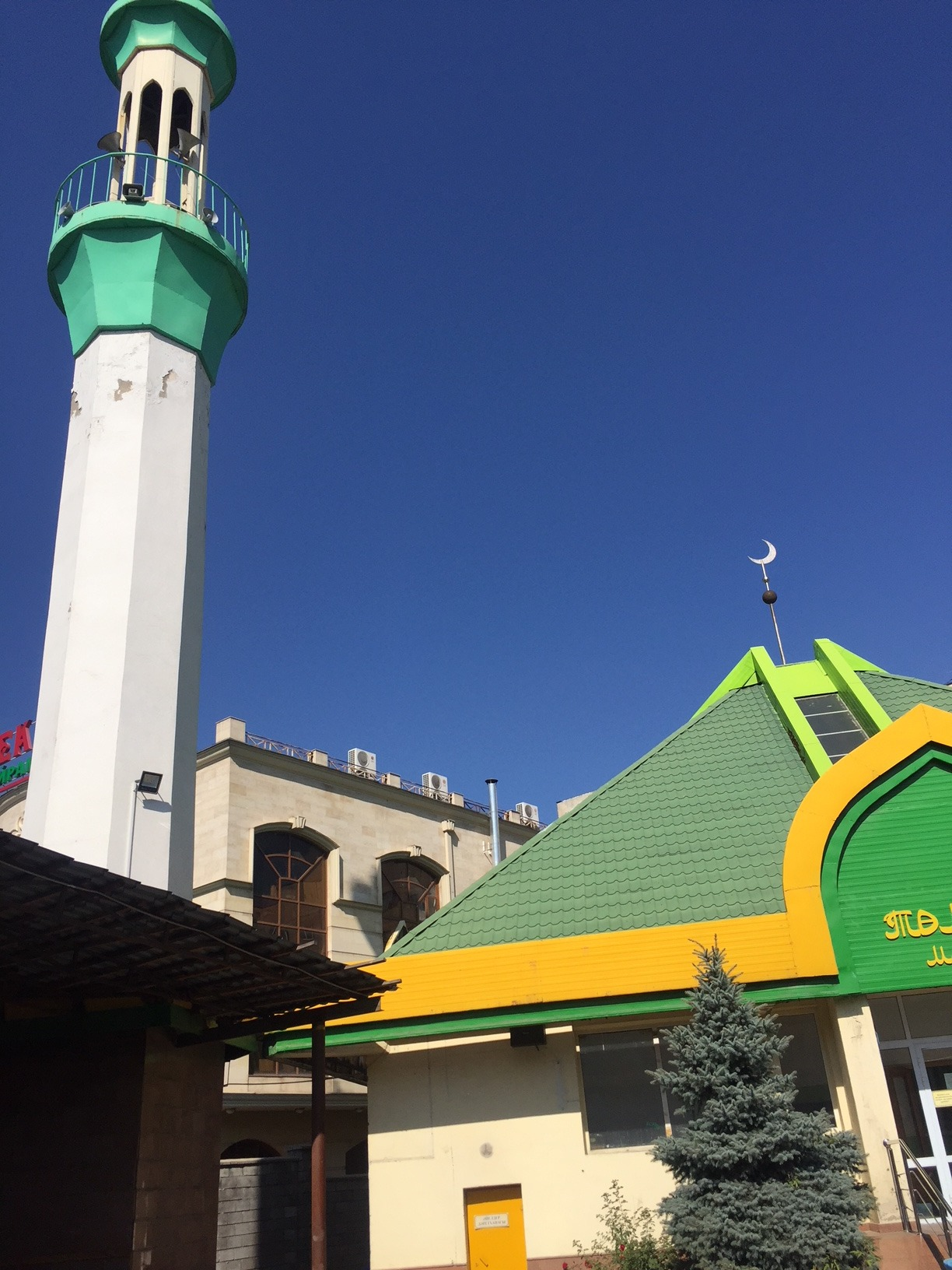 Мечеть в Тастаке, Алматы